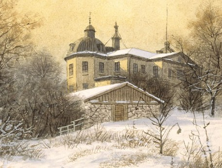 Kvarteret BLECKTORNET. Katarina församling. Stora blecktornet. Södermalm.